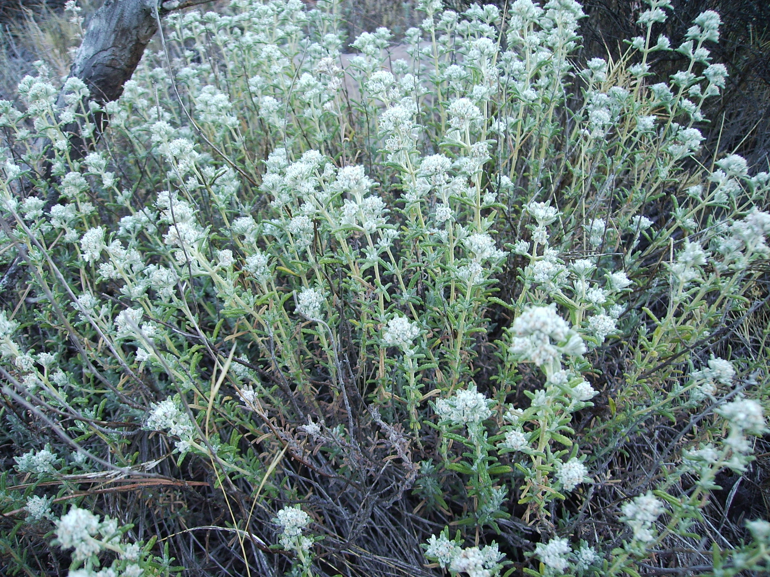 Image:Teucrium capitatum2006.jpg Teucrium capitatum shrub flowering in july at Castelltallat, Catalonia